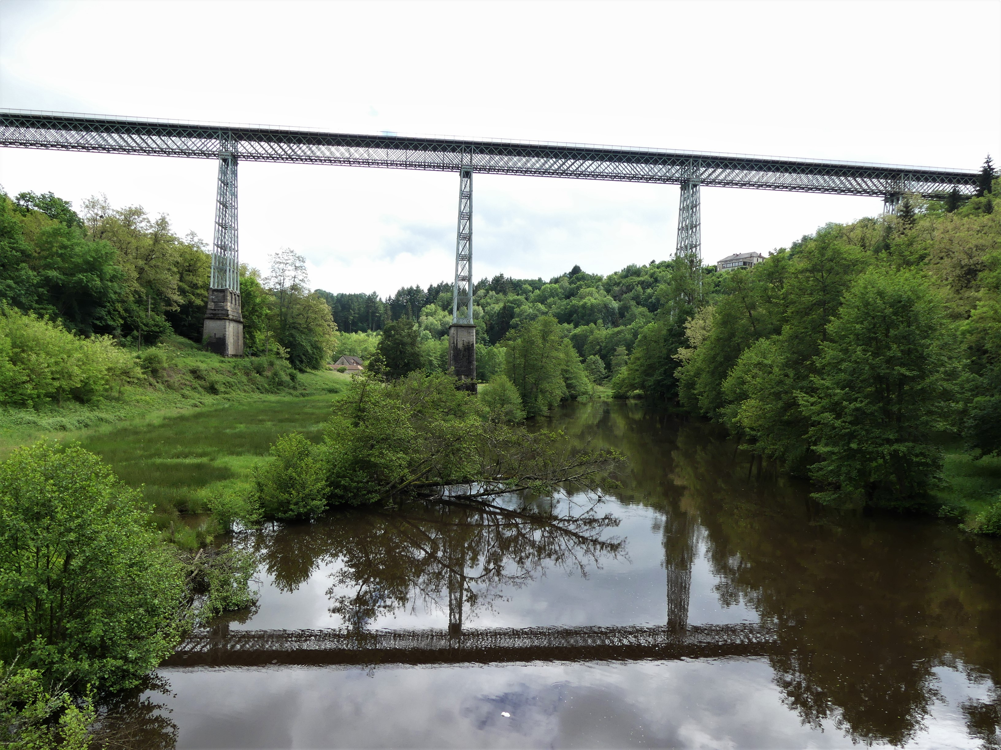 Le viaduc de Busseau sur la Creuse entre Pionnat (à gauche) et Ahun (à droite), Creuse, France. Vue prise en direction de l'amont.